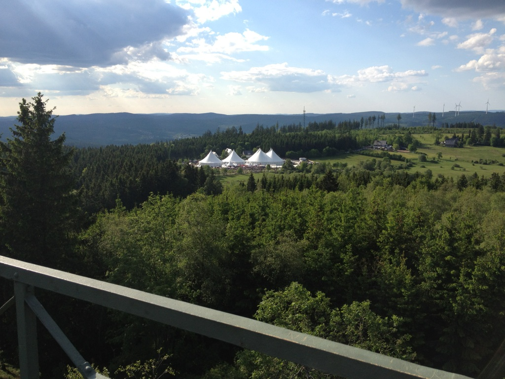 Zeltstadt anlässlich Kultur Pur am Giller 2012.